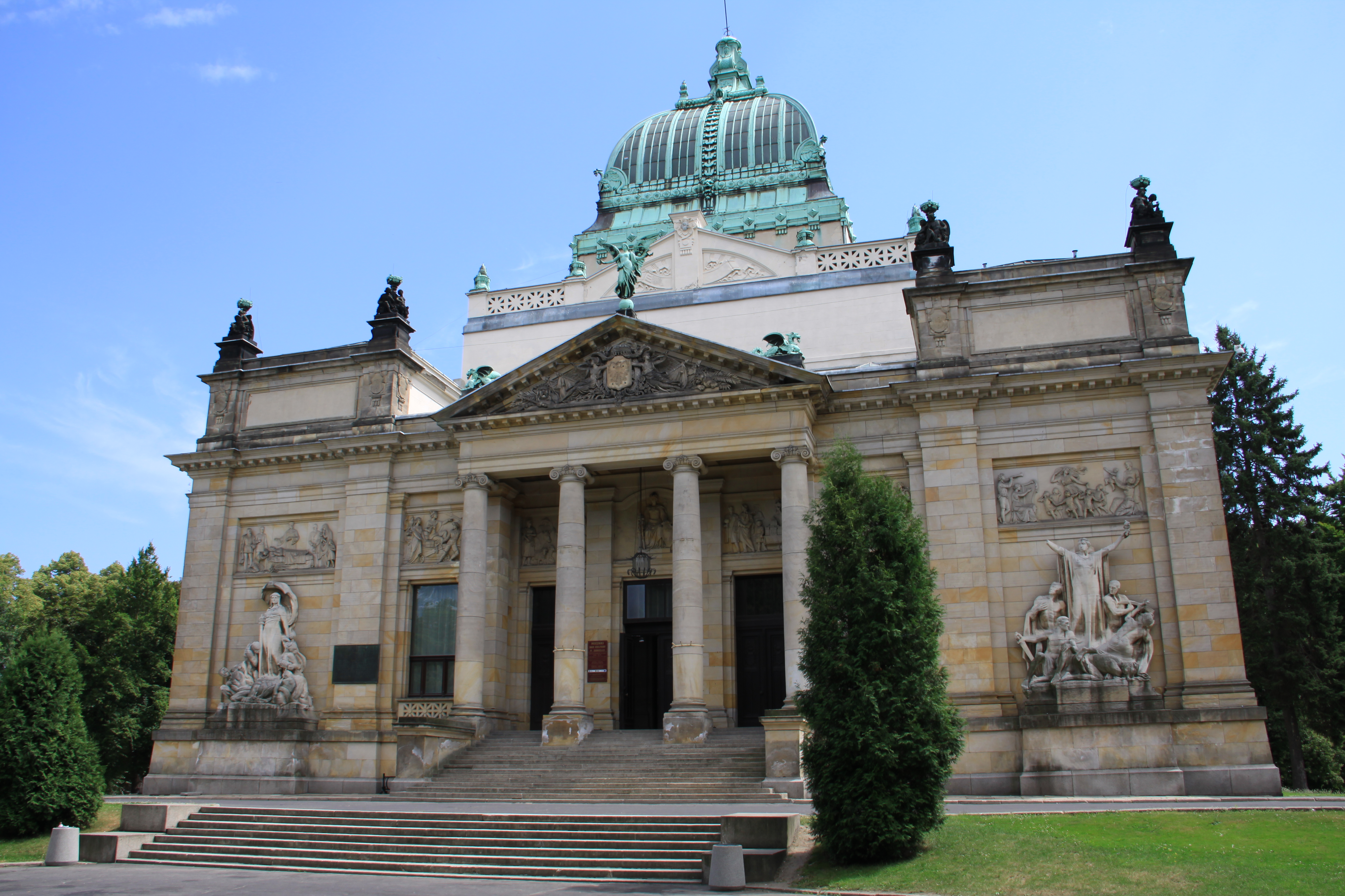 Zgorzelec, dom kultury, 1898-1902